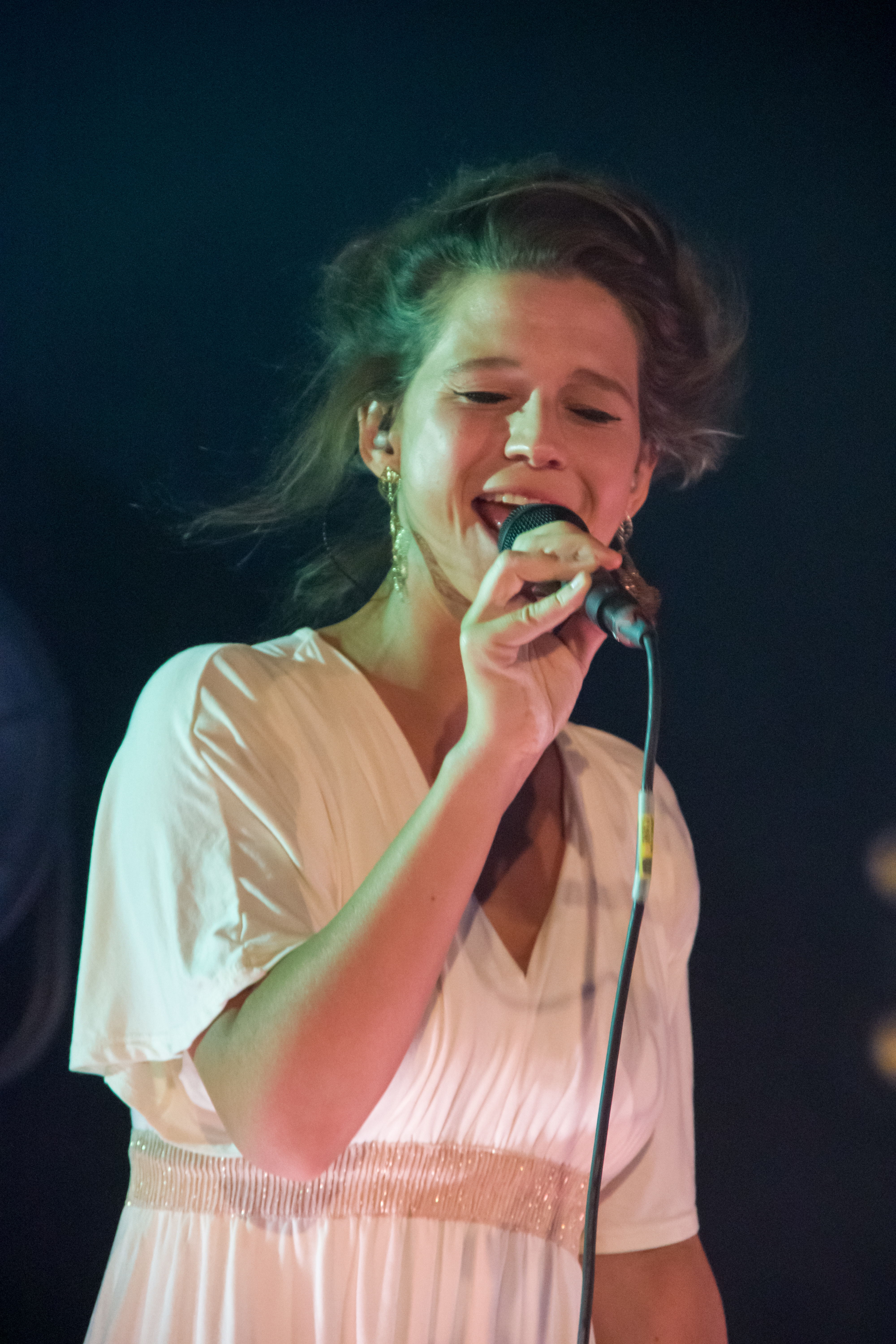 Das Zelt-Musik-Festival 2018 in Freiburg im Breisgau 26.07.2018 Selah Sue